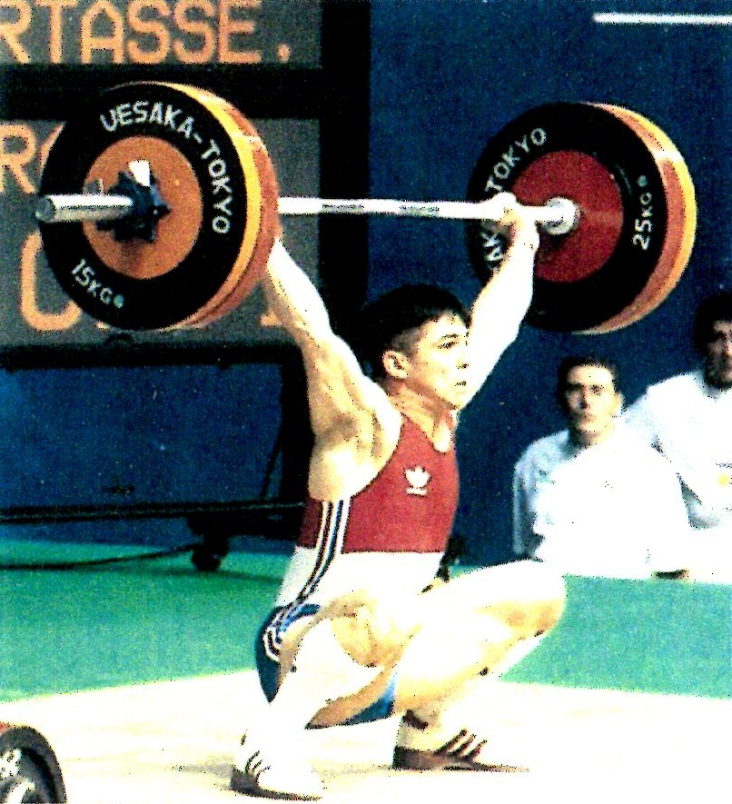 Laurent Fombertasse aux JO de Barcelone 1992